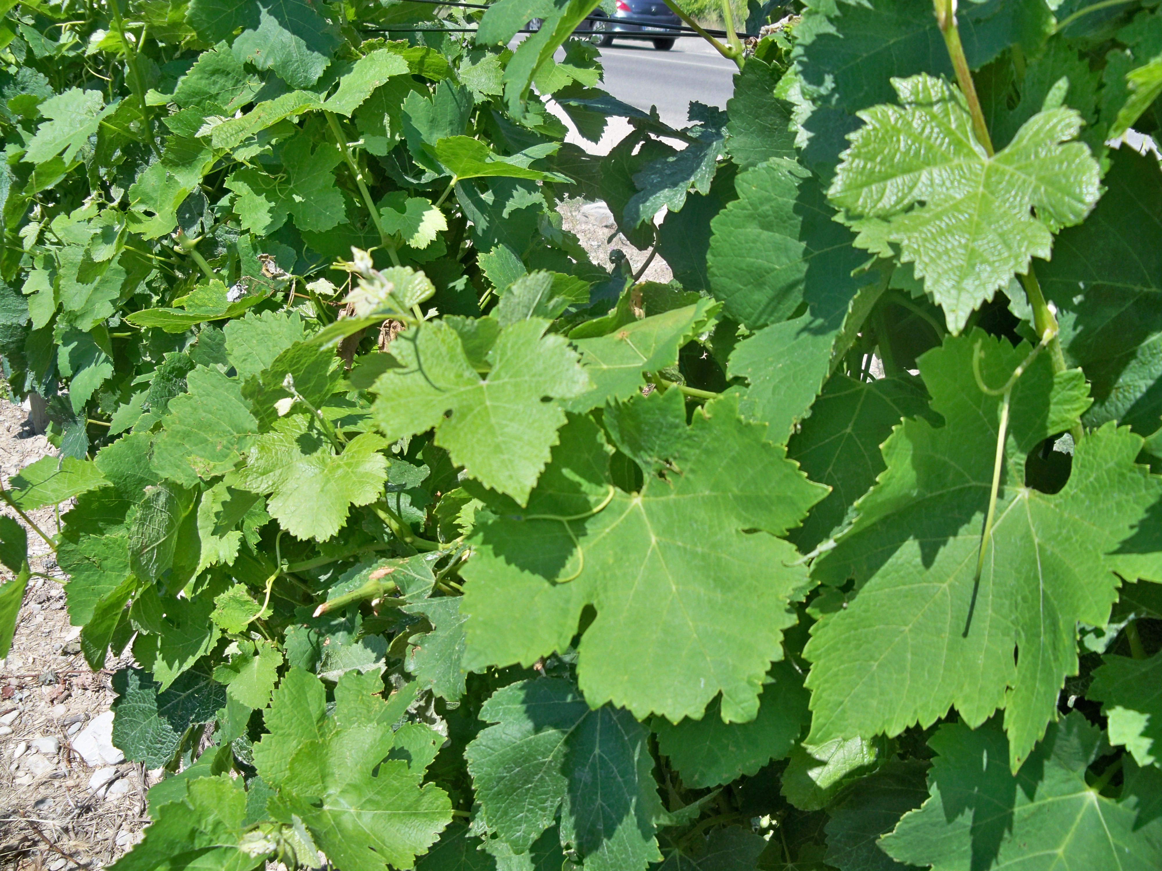 Feuilles de vignes - Syrah